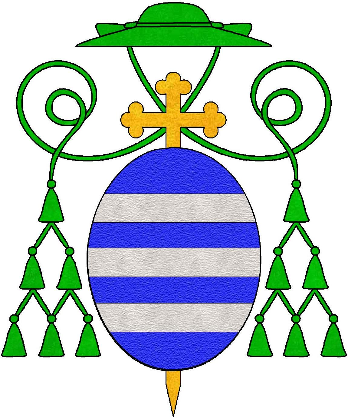 Stemma del vescovo Berardo Maggi Stemma del vescovo Federico Maggi